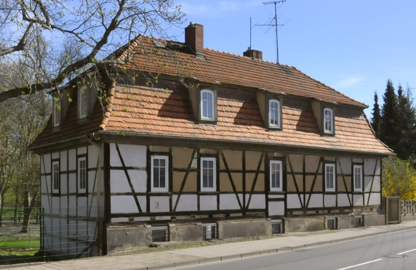 Mühlgrabenweg 15